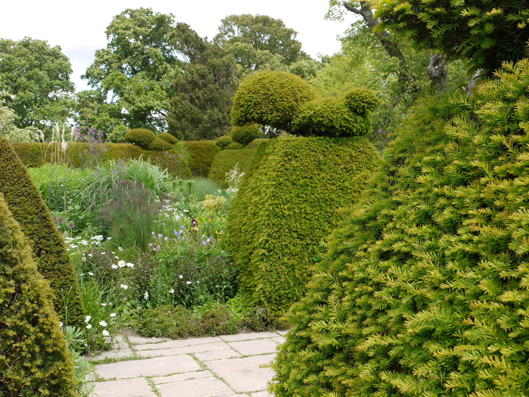 Great Dixter: Detailansicht aus dem Garten mit Staudenbeeten und Eiben in Formschnitt